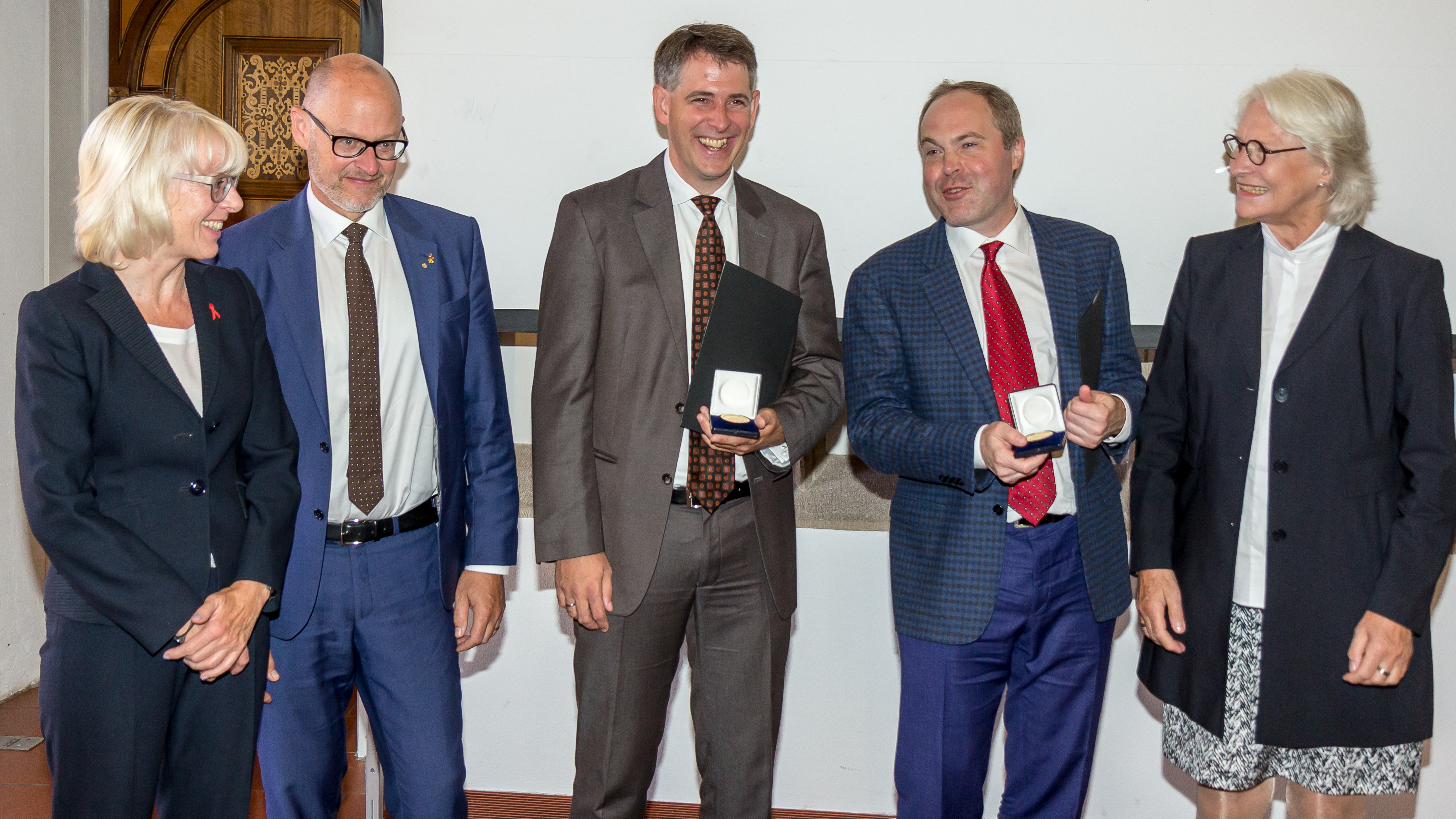 Verleihung Zülch-Preis 2016 im Hansasaal des Historischesn Rathauses von Köln. Gruppenfoto: Bürgermeisterin Elfi Scho-Antwerpes, Vize-Präsident der Max-Planck-Gesellschaft Prof. Dr. Bill S. Hansson, Preisträger Prof. Dr. Stefan M. Pfister, Preisträger Prof. Dr. Michael D. Taylor, Frau Zülch